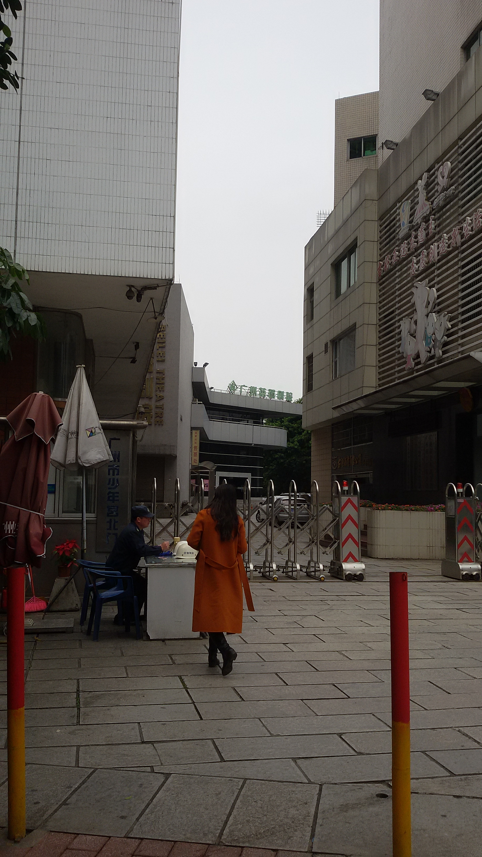 粵語: 广州蓓蕾剧院